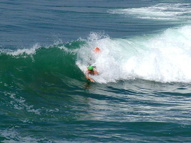 Bodysurfing